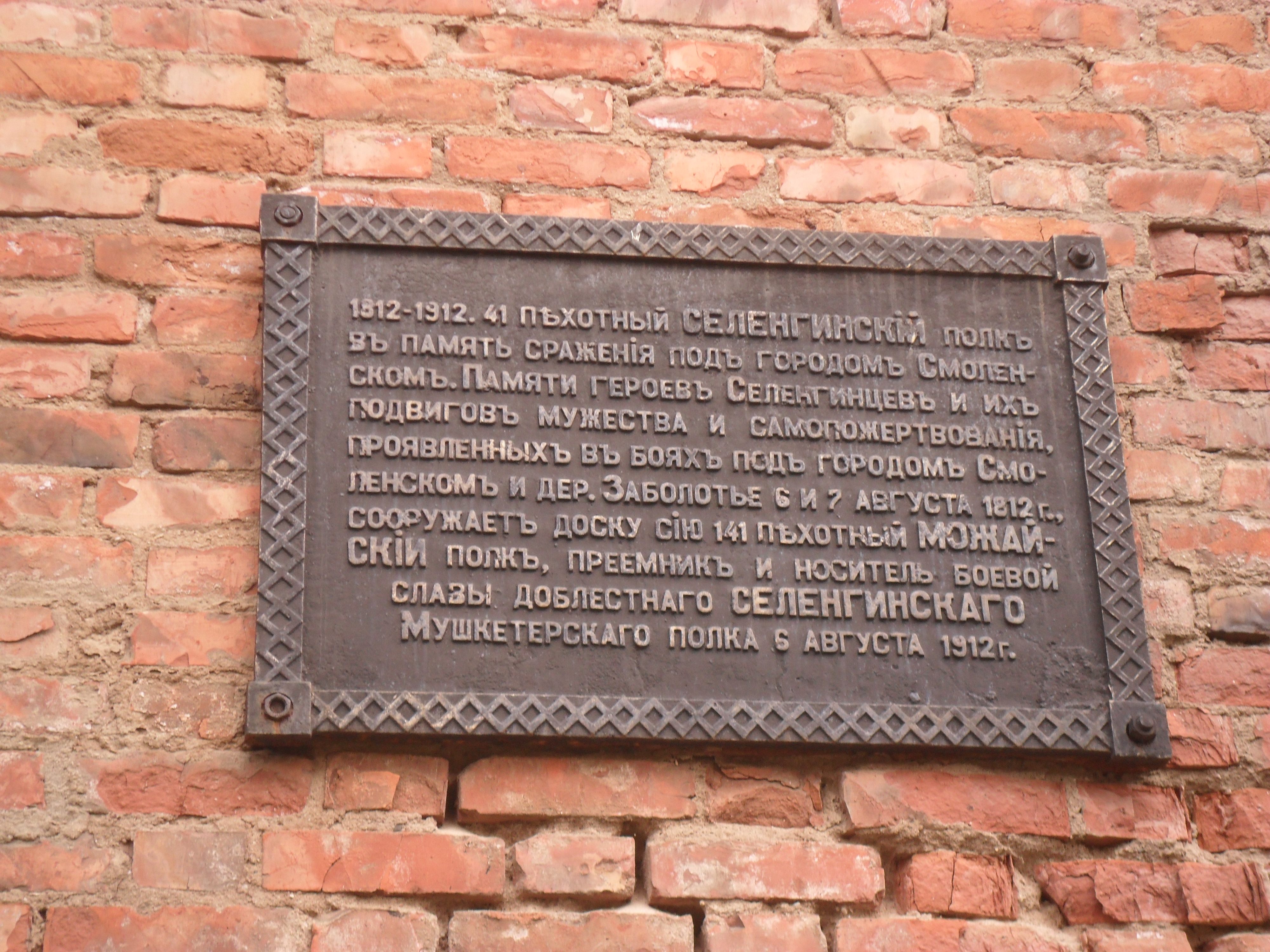 Скрижаль, установленная в 1912 году в память участия в боях за Смоленск в 1812 году Селенгинского полка.